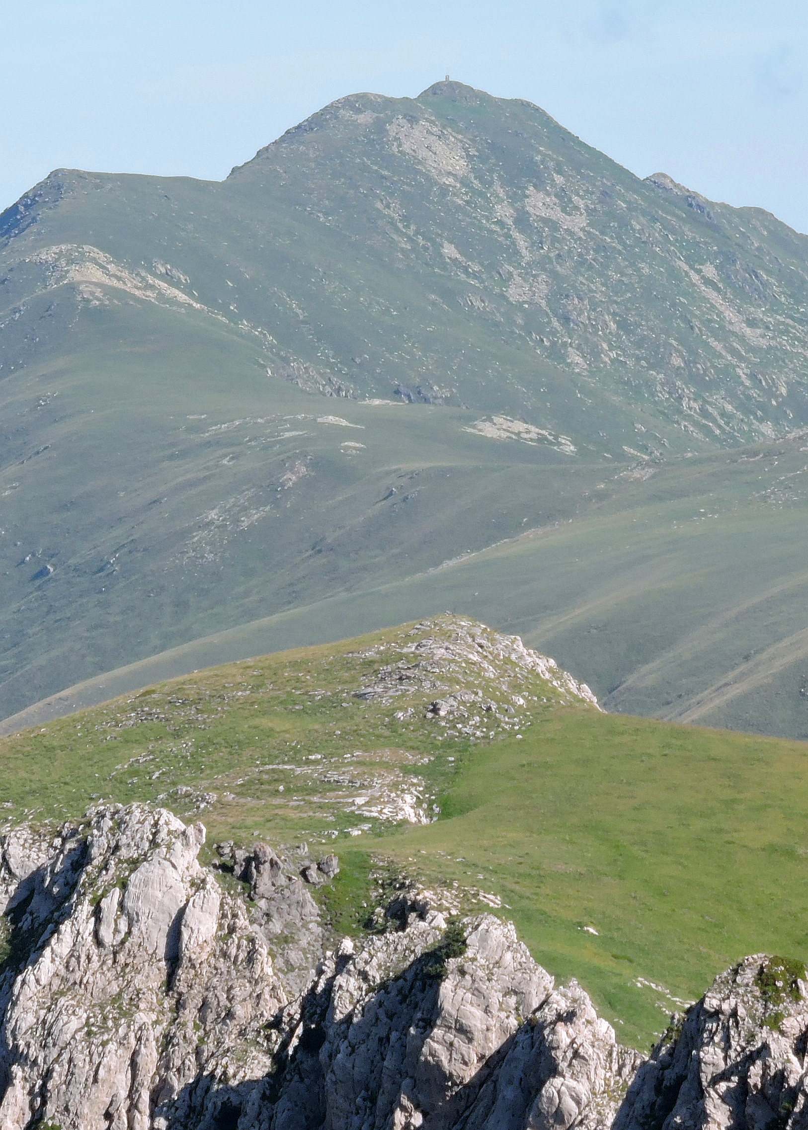 Il Bric Costa Rossa visto dal colle del Cros (Alpi Liguri)